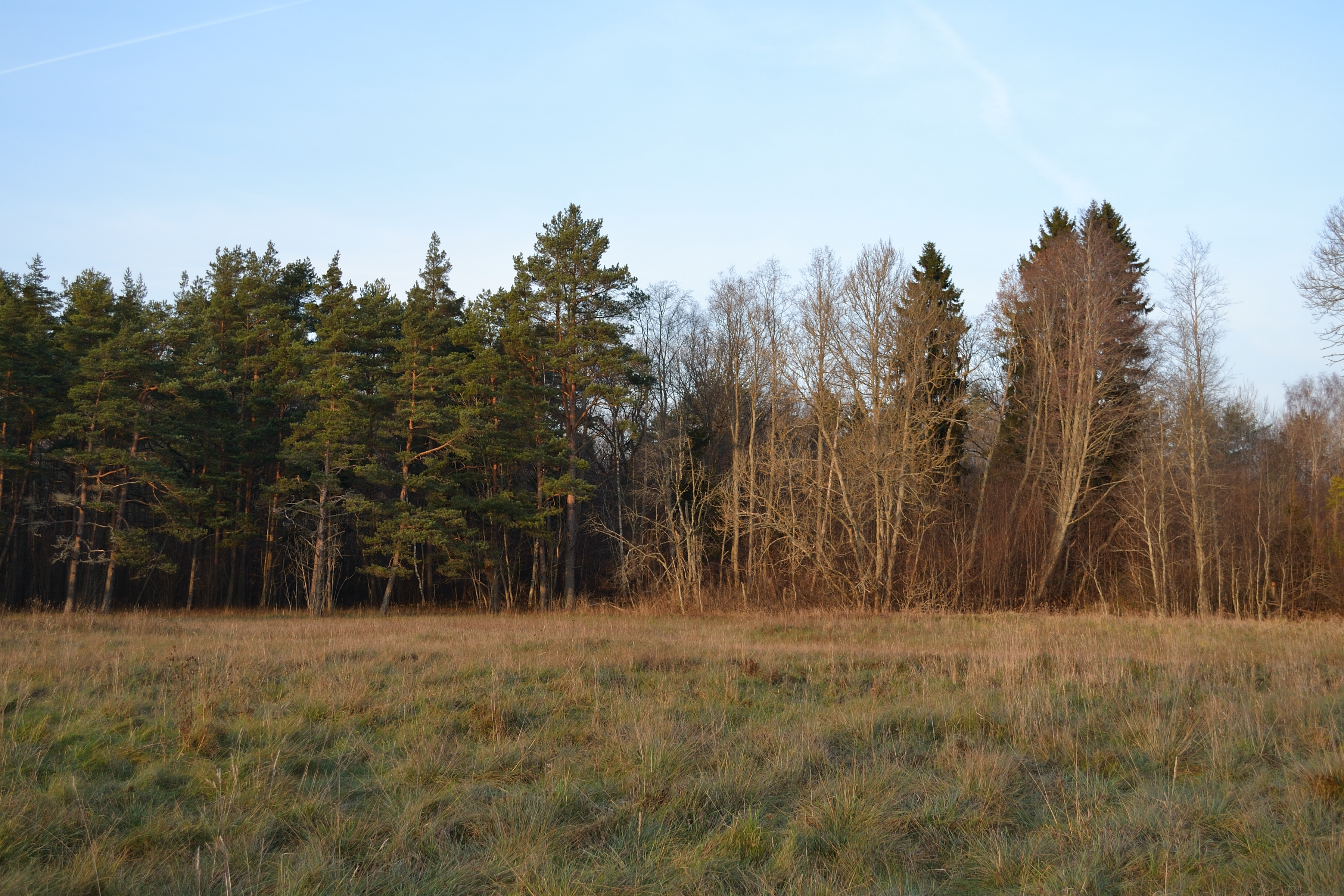 Surnumäe, Keila